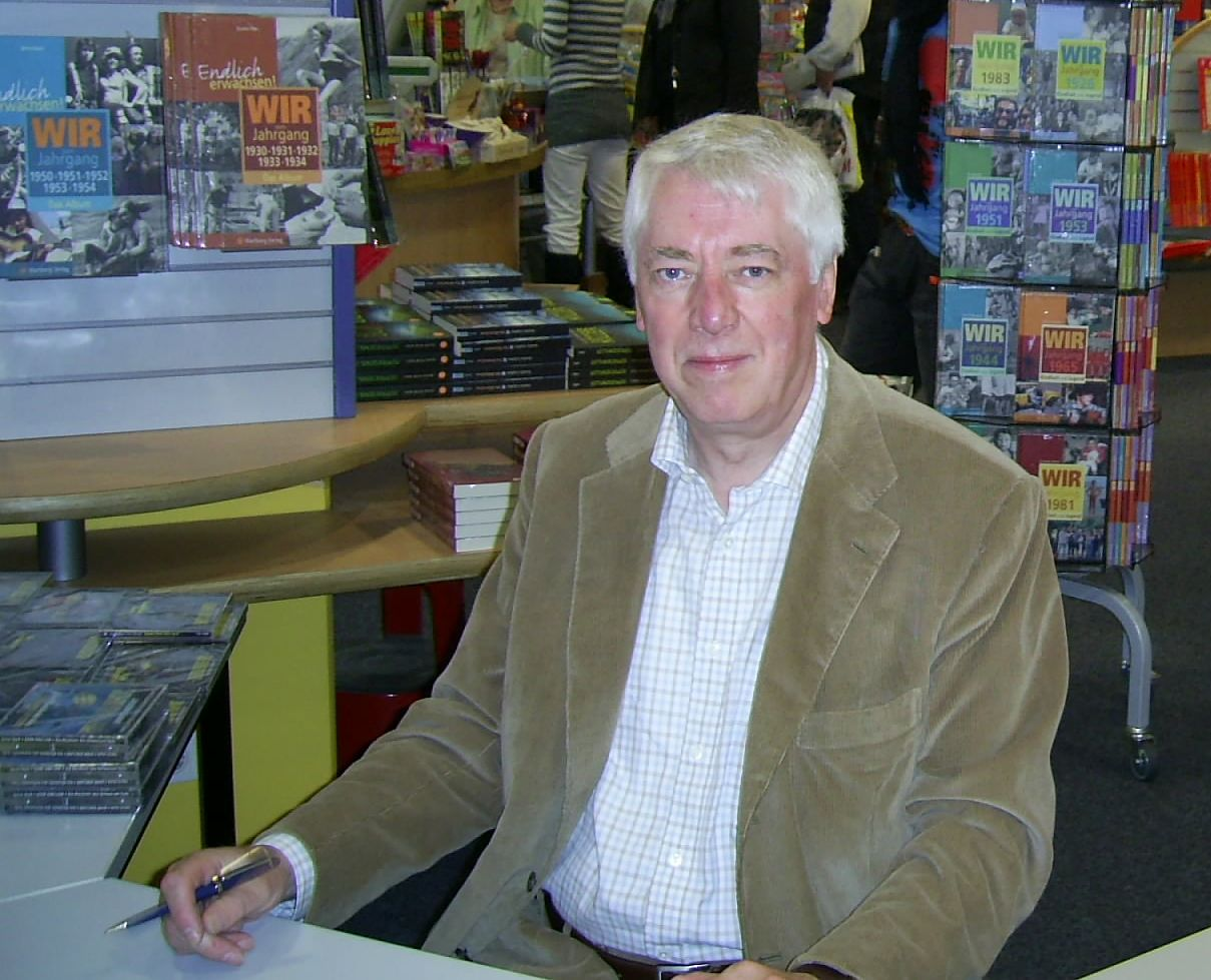 Helmut Rellergerd bei einer Signierstunde am 20. September 2008 in Wilhelmshaven.